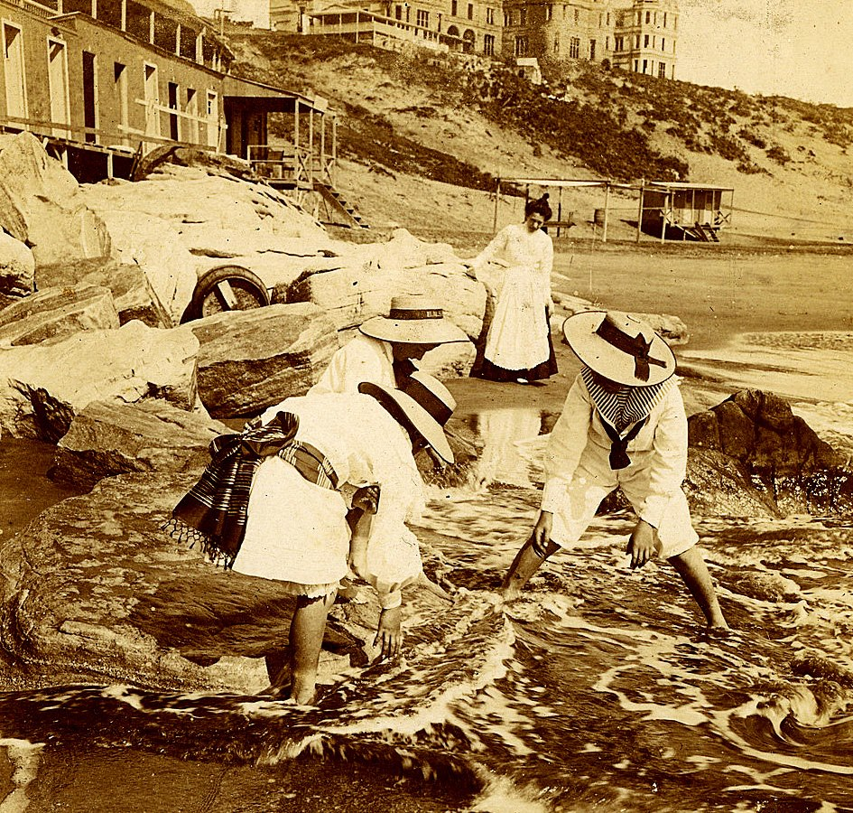 Bañistas en la Playa de los Ingleses, hoy llamada Playa Varese, en Mar del Plata. Arriba de los acantilados, asoma el abandonado Hotel Saint James, nunca teminado.